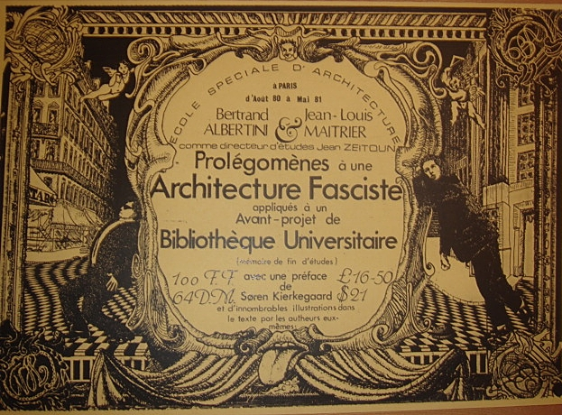 Couverture d'un projet de fin d'études d'architecte Prolégomène à une architecture Ecole spéciale d'architecture, Paris, 1980-1981, préface Kirkegaard